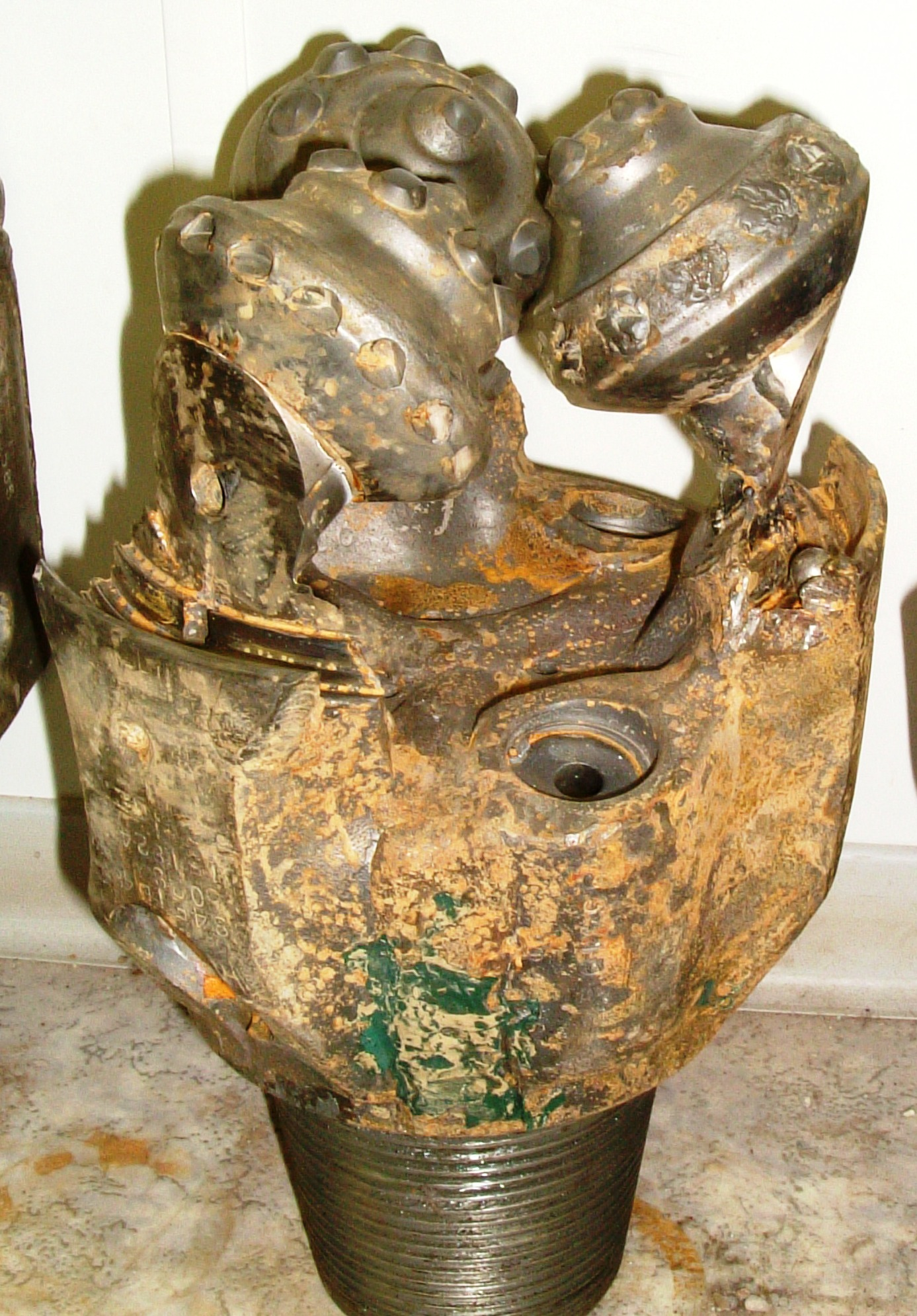 Ein extrem abgenutzter Rollenmeißel nach dem Ausbau